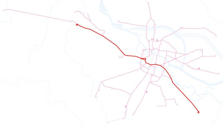 Poglądowa mapka przebiegu linii tramwajowej 3 we Wrocławiu.